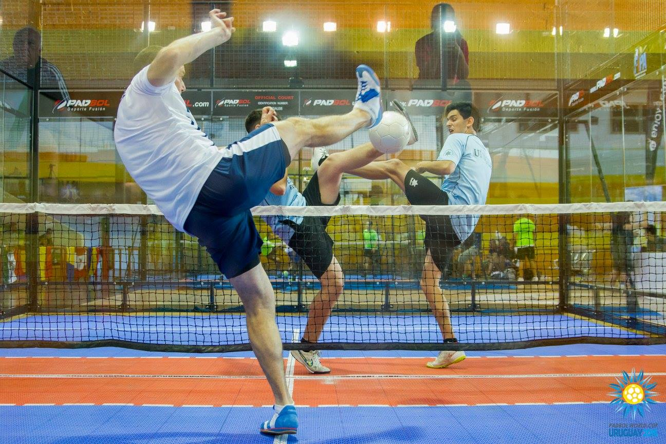 Francia vs Uruguay